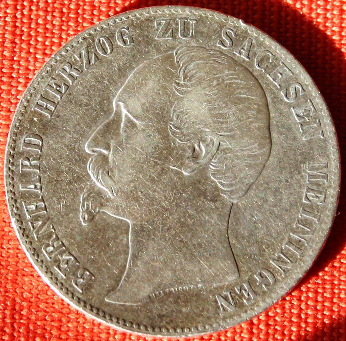 Vereinstaler Sachsen Meiningen mit Konterfei Hzg Bernhard